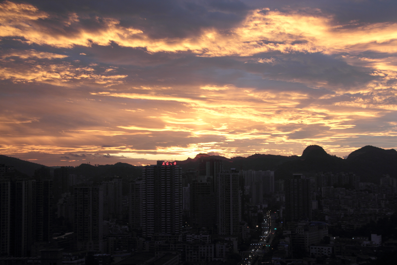 Huaxi, Guiyang, Guizhou, China